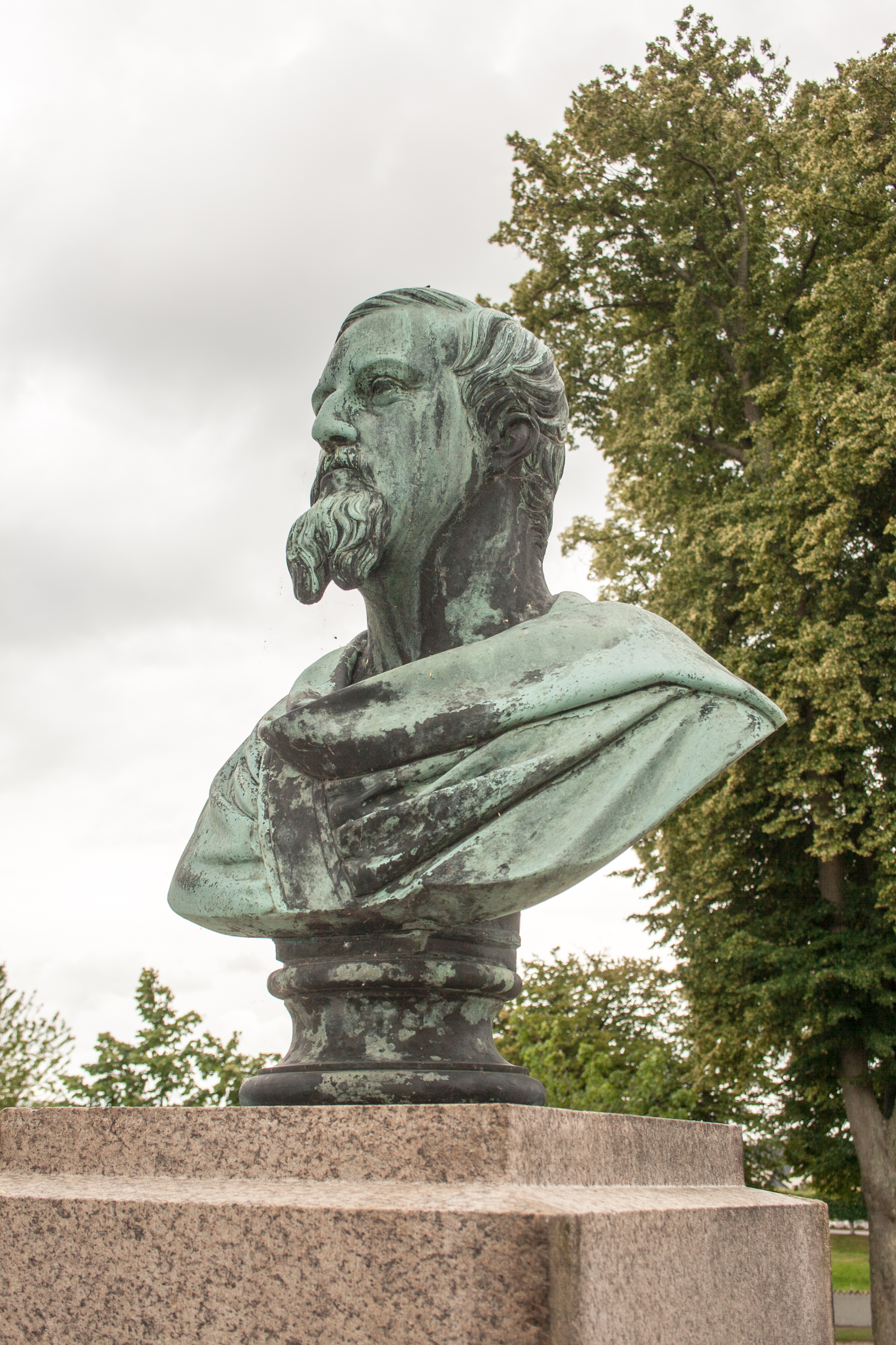 Vordingborg, bust of Frederik VII